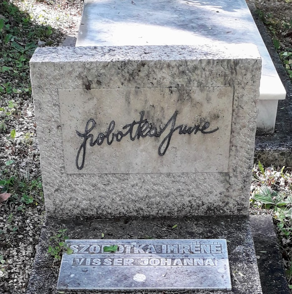 Szobotka Imre (festőművész, grafikus) /1890-1961/ síremléke. Farkasréti temető 1/7. (1/D.) parcella 1-46. Feleségével /sz. Visser Johanna/ közös sírhely.